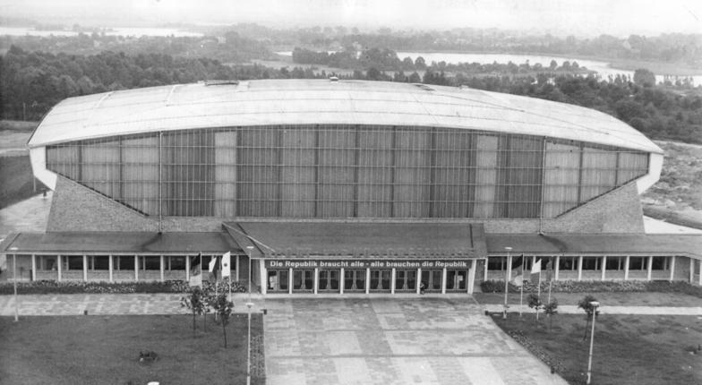 Schwerin, Sport- und Kongresshalle Zentralbild Klar-Kohls 15.9.1964 15. Jahrestag der DDR Die Sport- und Kongreßhalle in Schwerin In ihrer architektonischen Gestaltung zählt die Halle zu den modernsten der DDR. Das Aluminiumdach umfaßt 5600 m². Vier Pfeiler und zwei Querträger zu je 80 t tragen die Halle. Das Gesamtgewicht der Stahlkonstruktion mit seiner Verglasung beträgt 500 t. bei bühnen- und Boxveranstaltungen finden 8000 Zuschauer Platz. bei anderen sportveranstaltungen wie Hallenhandball oder Leichtathletik sind es 6000 Plätze. die letzten sportlichen Höhepunkte erlebte dieser hochmoderne Bau bei den Olympia-Ausscheidungskämpfen im Boxen und Turnen (Frauen).